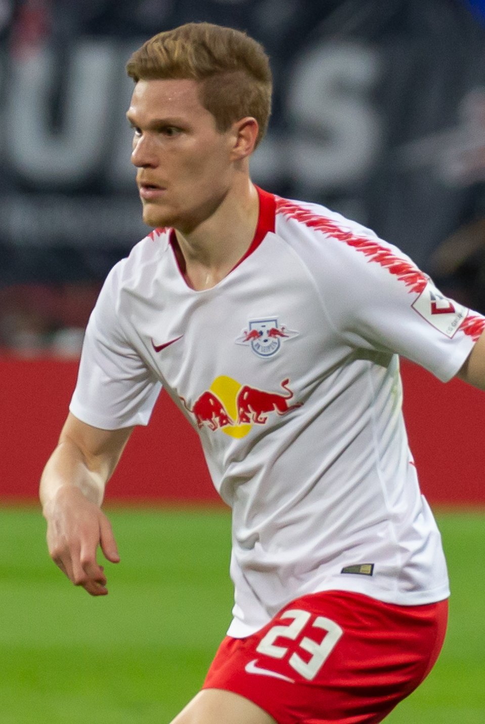 Fußball, Männer, 1. Bundesliga, RB Leipzig - Hertha BSC; Marcel Halstenberg (RB Leipzig, 23); Freisteller, Einzelbild, Aktion, action